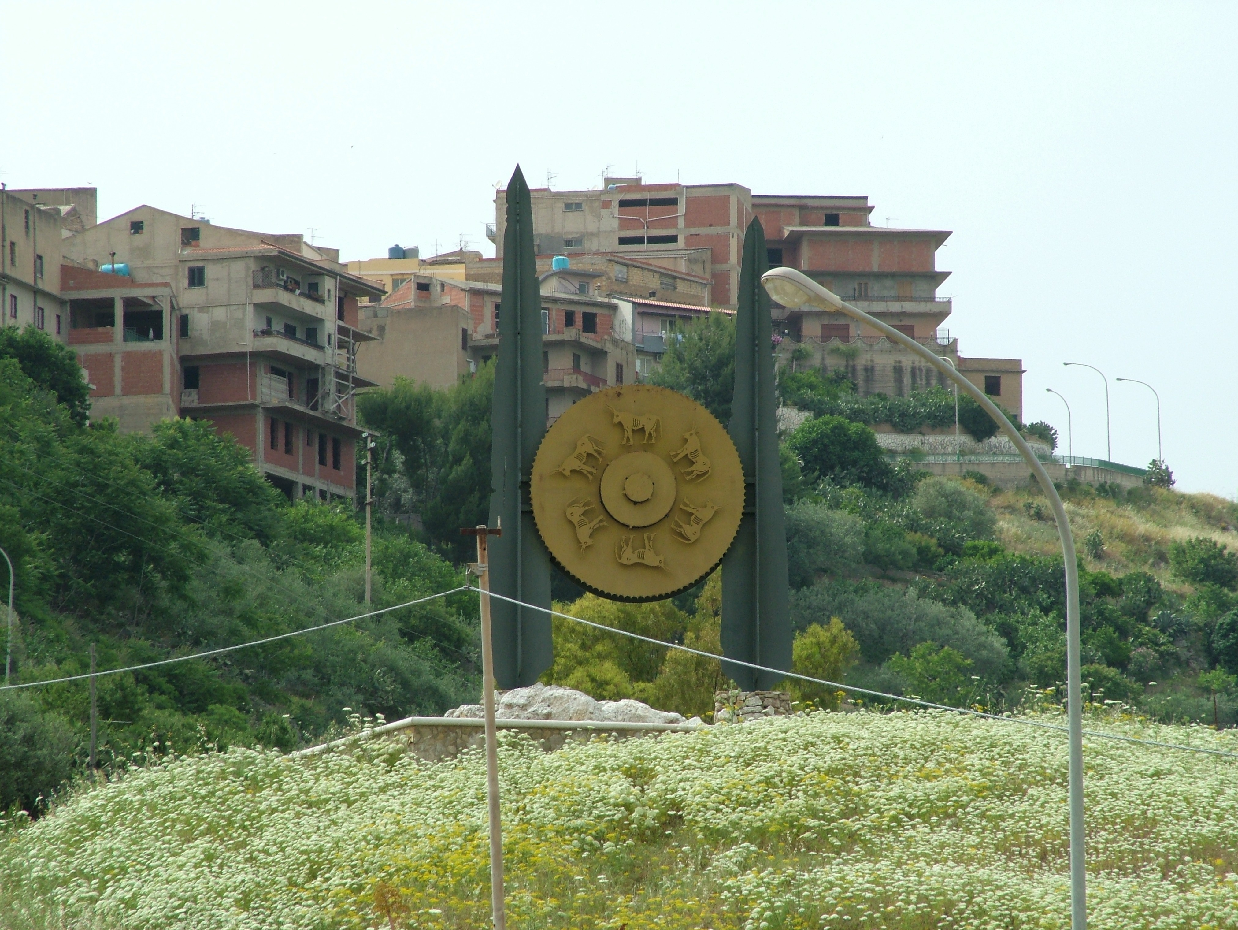 Sant' Angelo Muxaro, Sizilien, Denkmal der Goldscheibe, das Original ist im Britischen Museum, London, ein Kopie im Areologischen Museum Agrigent